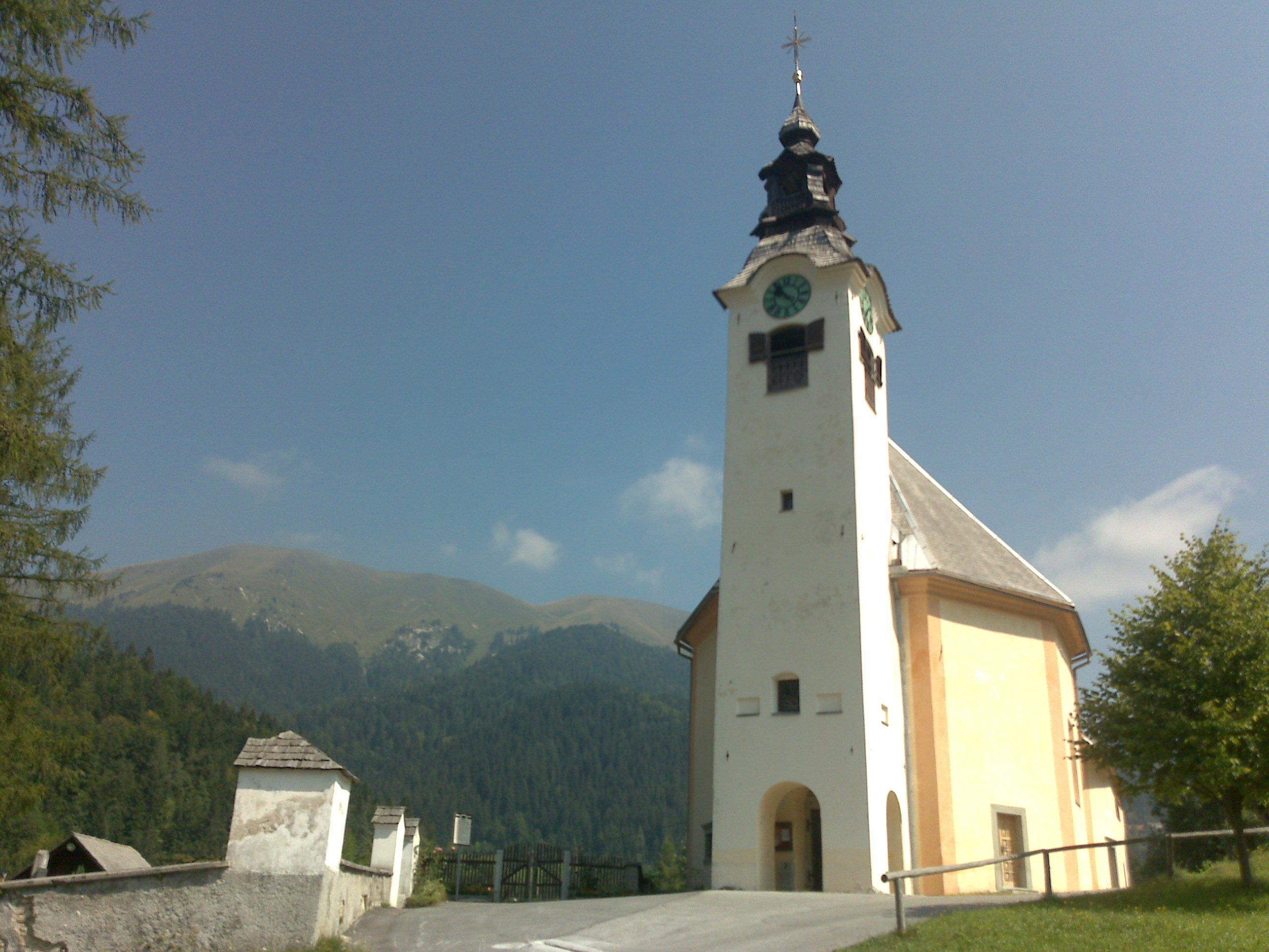 Planina pod Golico - cerkev